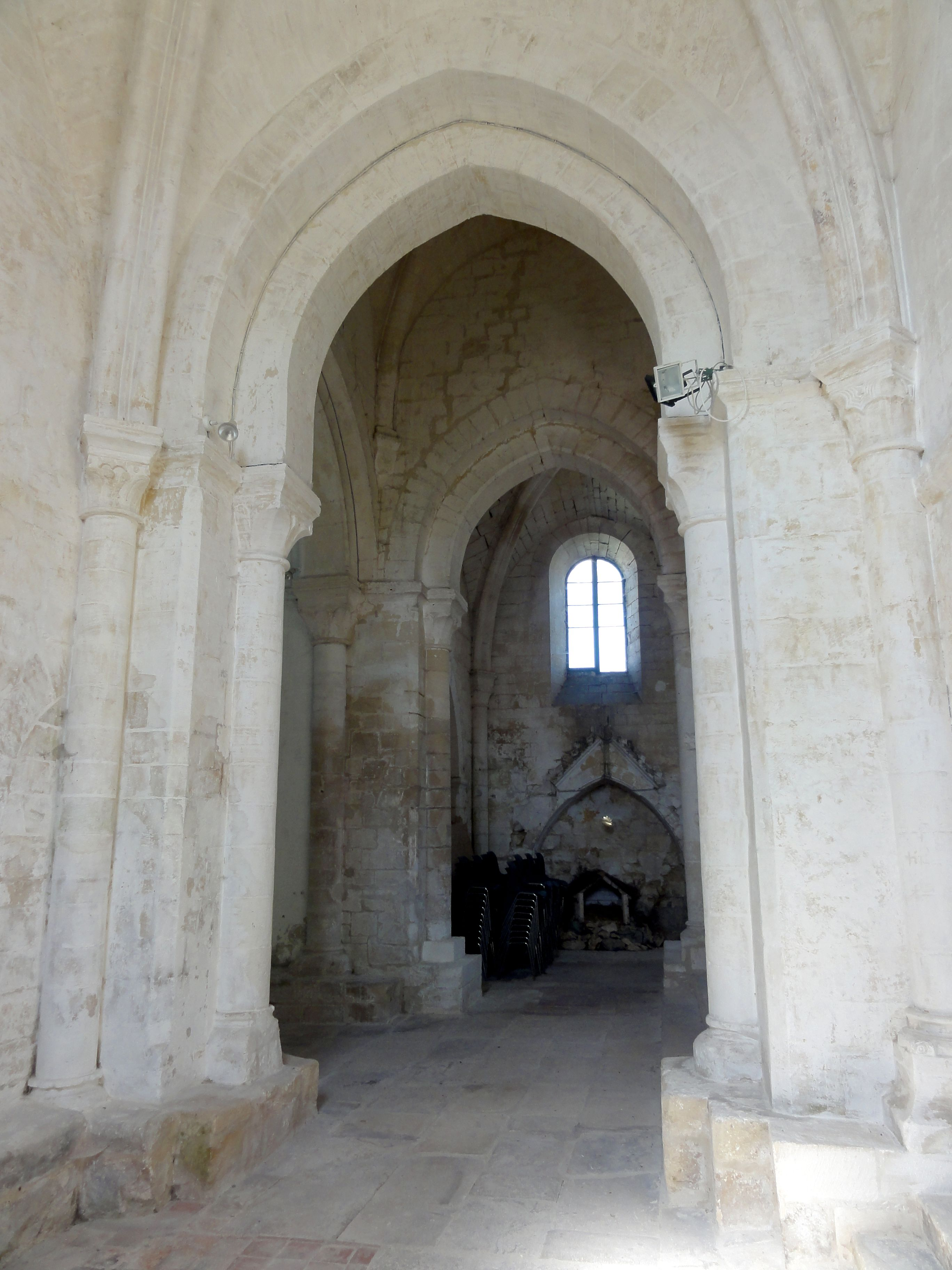 Croisillon sud, vue vers le nord.